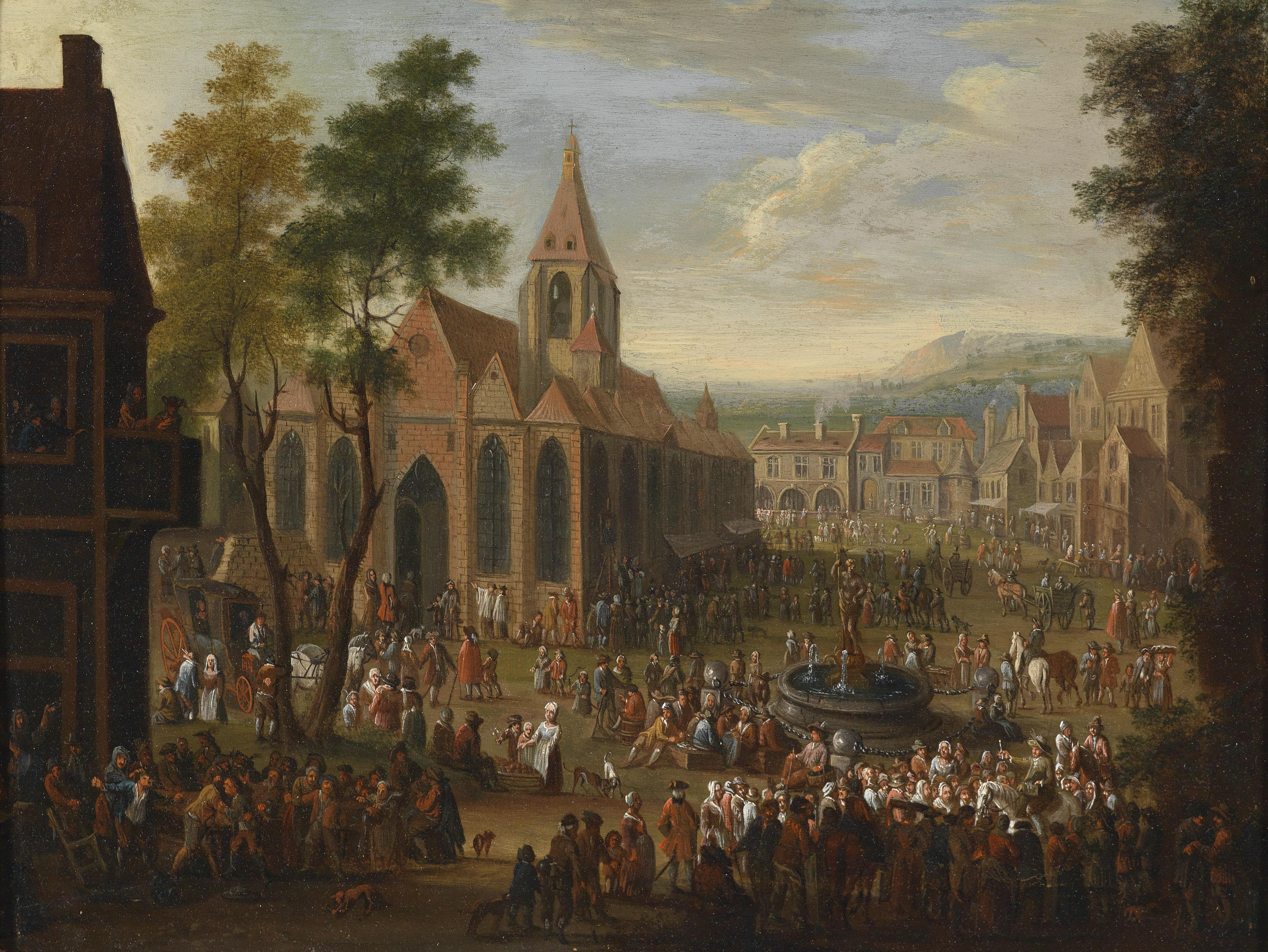 Ein Fest auf einem städtischen Platz mit zahlreichen Figuren